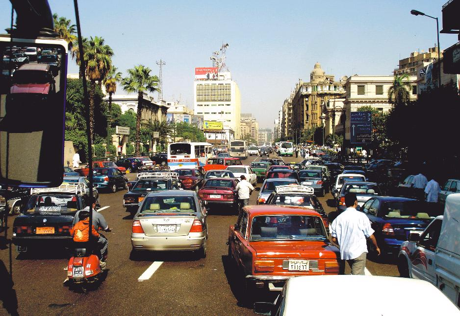 Trânsito do Cairo